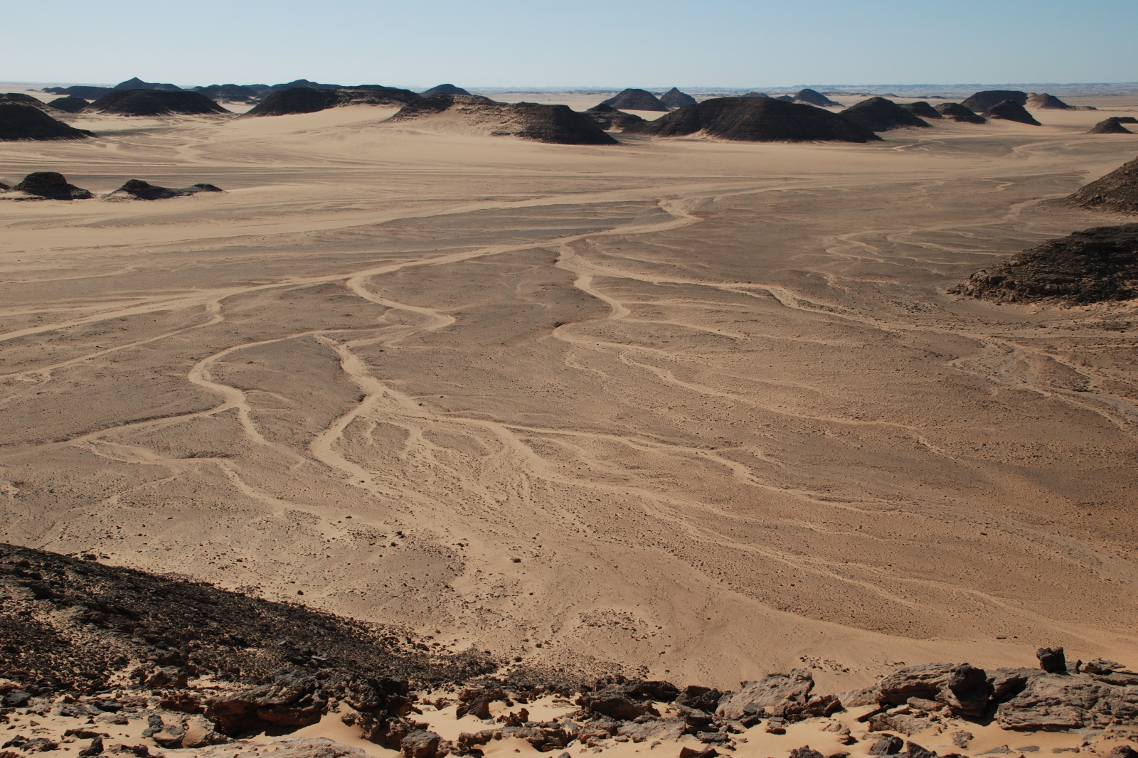 8 km NE Wadi Halfa market, Sudan